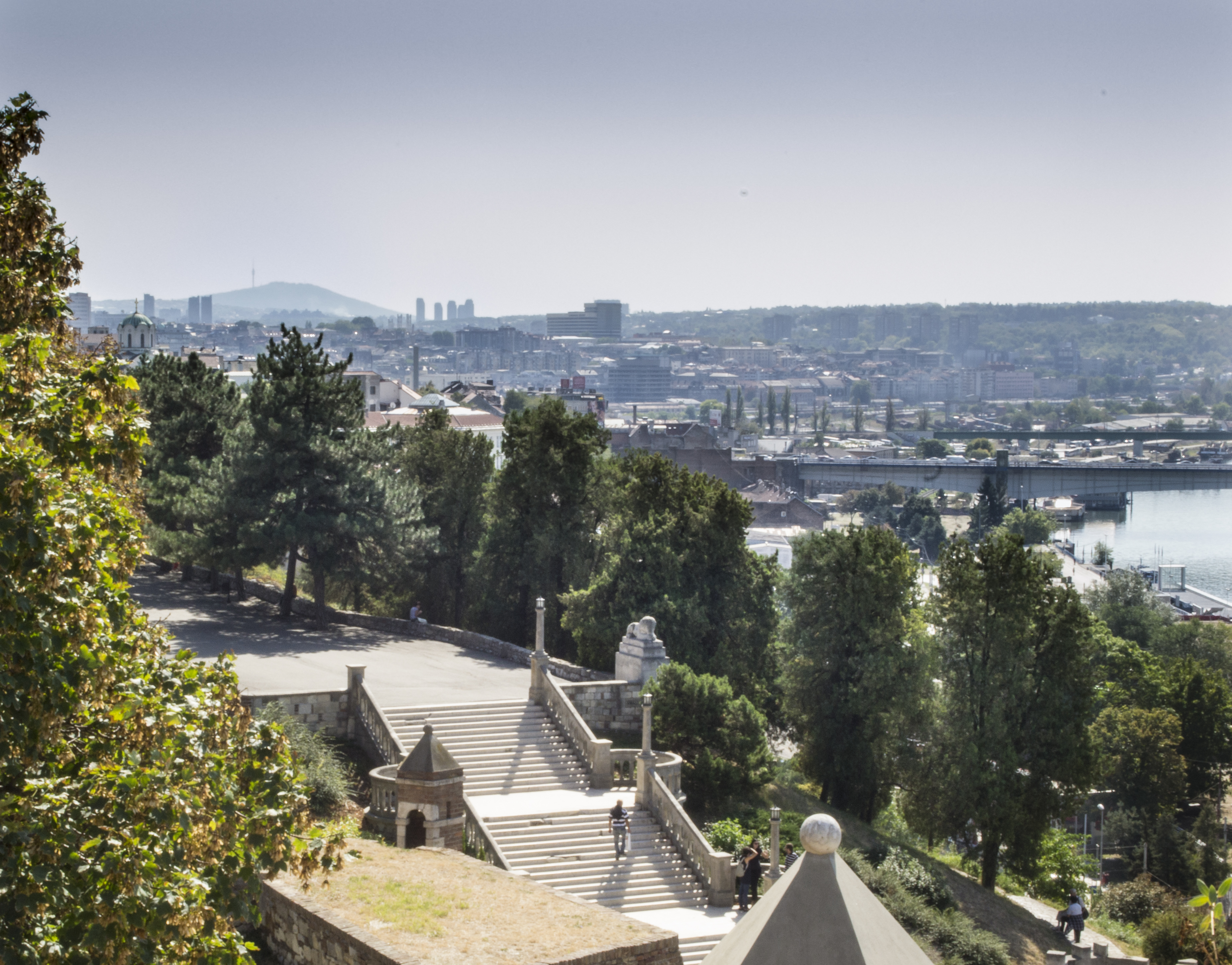 Pogled sa jedne od osmatračnica na Kalemegdanu. U prvom planu su "malo i veliko" stepenište, sa desne strane "Brankov" most preko reke Save, delovi stambeno-poslovnog dela grada i u pozadini planina Avala sa svojim nezaboravnim orjentirom "Avalskim" tornjem...